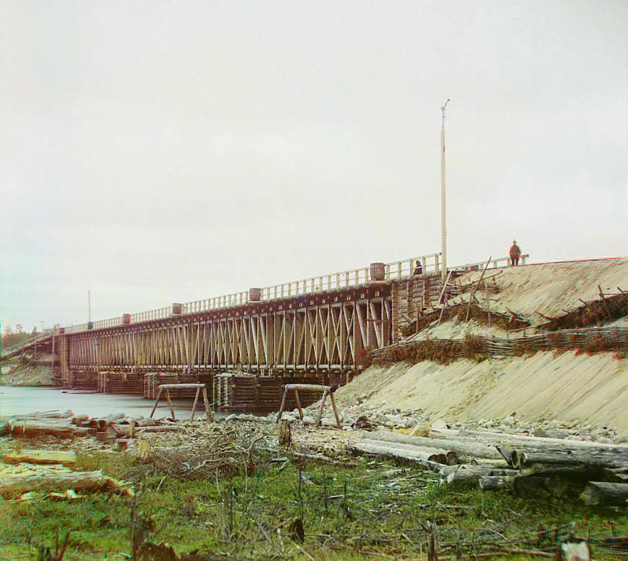 Ж.д. мост через реку Сегеж[а]. [1916 год]